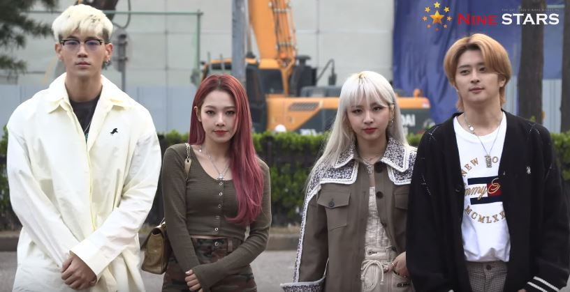 4월 12일 KBS 뮤직뱅크에 카드가 출근하고 있다.